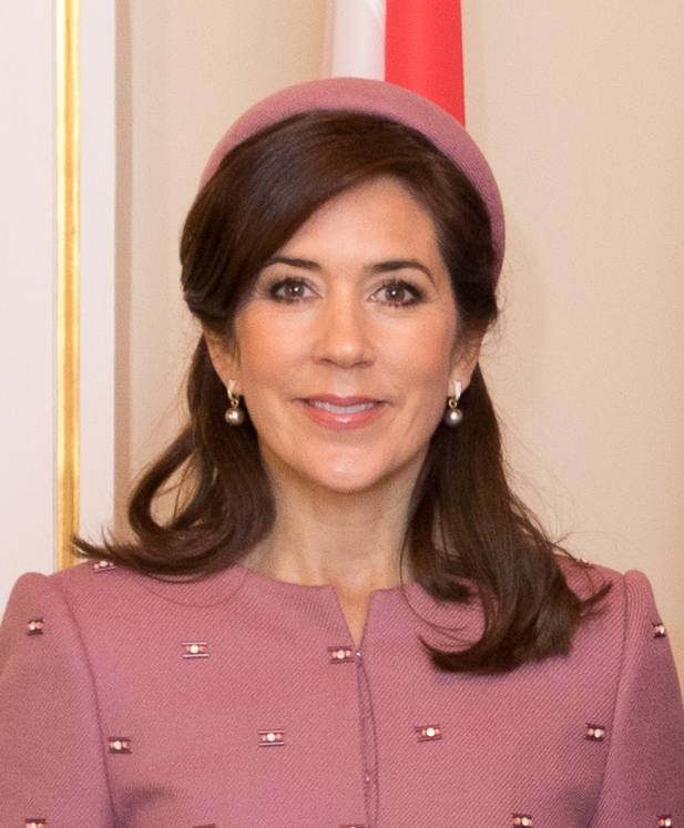 2018.gada 6.decembris. Saeimas priekšsēdētāja Ināra Mūrniece parlamentā uzņem Dānijas kroņprinci Frederiku un kroņprincesi Mēriju. Foto: Ernests Dinka, Saeima Izmantošanas noteikumi: saeima.lv/lv/autortiesibas